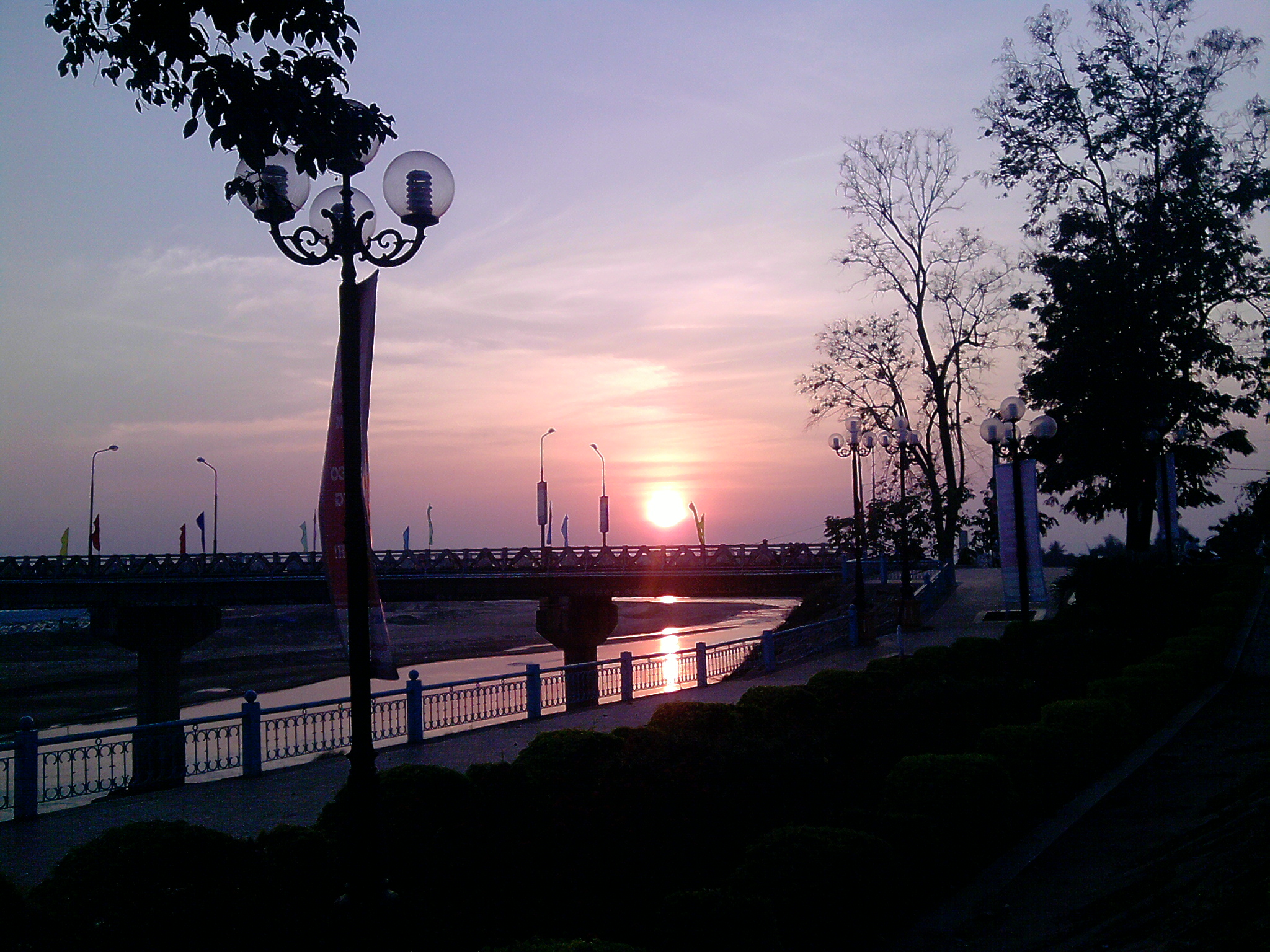 Hoàng hôn bên cầu Dakbla